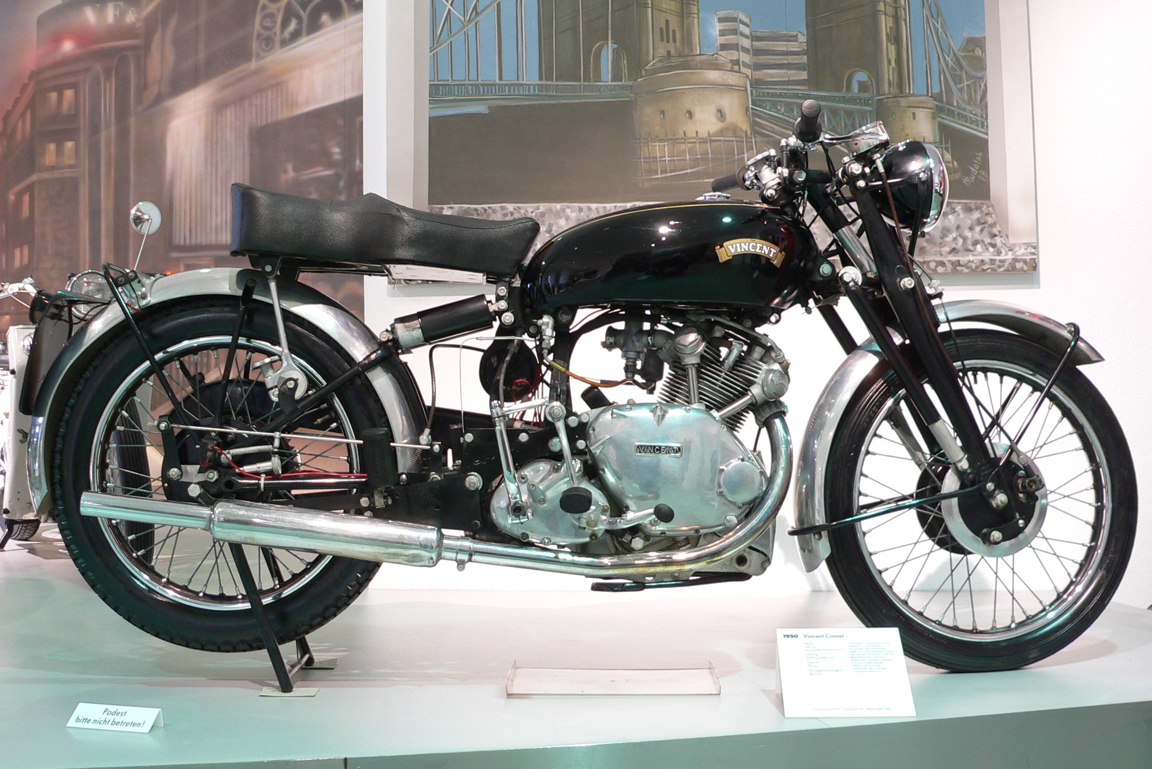 Motorbike "Vincent Comet" (1950) at the Deutsches Zweirad- und NSU-Museum (499 cm³, Einzylinder-Viertakt-Motor, 26 PS bei 5.000 U/min., 140 km/h)